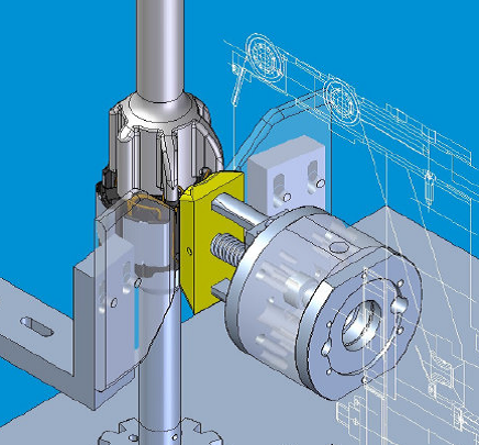 Schema des Flyerwickelns eines außen genuteten Vollblechschnittstators